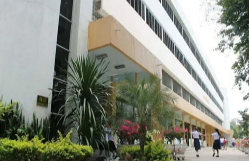 อาคารอดิเรกสาร(อาคาร 3) โรงเรียนมวกเหล็กวิทยา